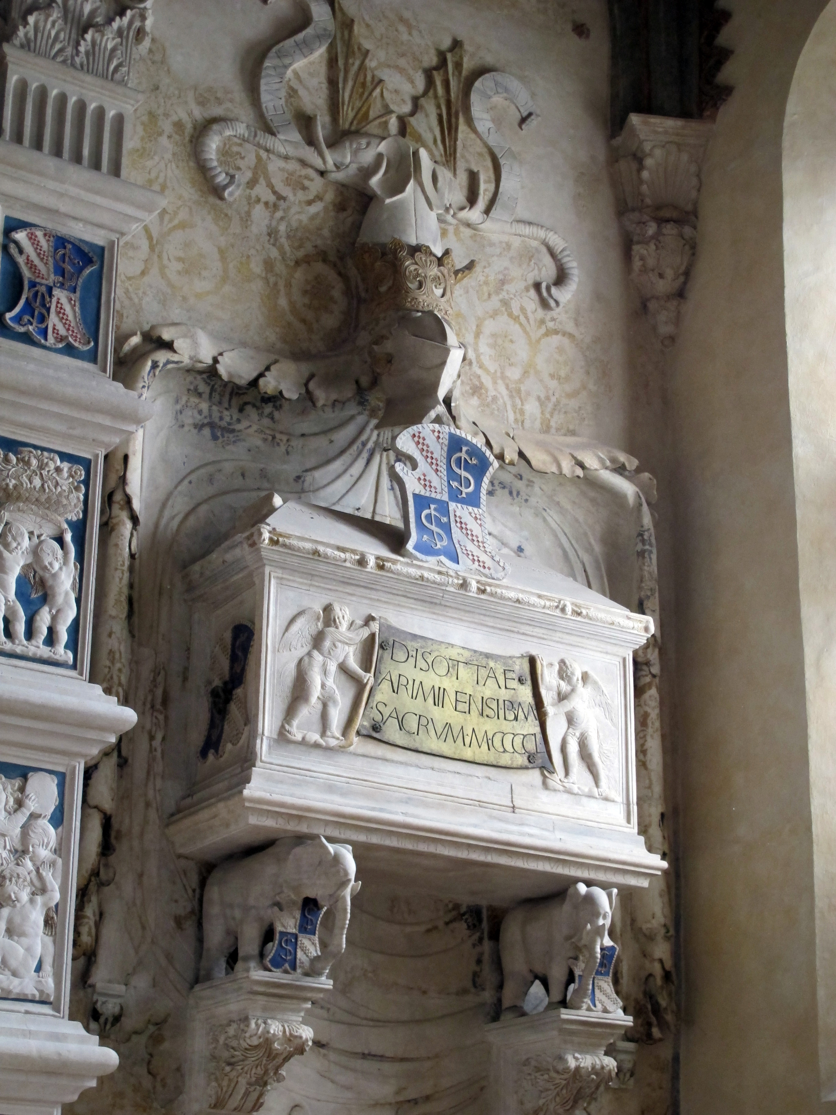 Tempio Malatestiano - MIBAC This is a photo of a monument which is part of cultural heritage of Italy.